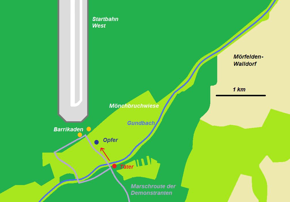 Tötungsdelikte an der Startbahn West; die Objekte sind vergrößert dargestellt, ansonsten ist die Karte maßstabsgetreu